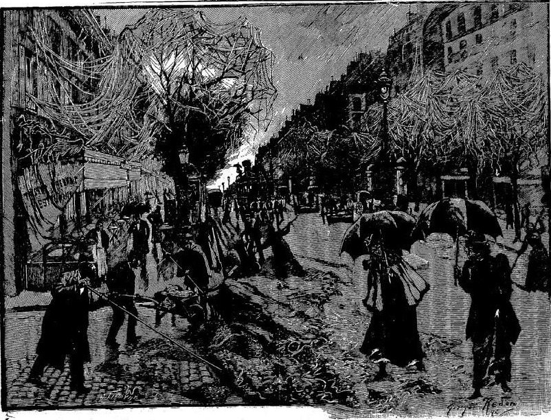 L'enlèvement des confettis sur les Grands Boulevards le lendemain de la Mi-Carême 1894.